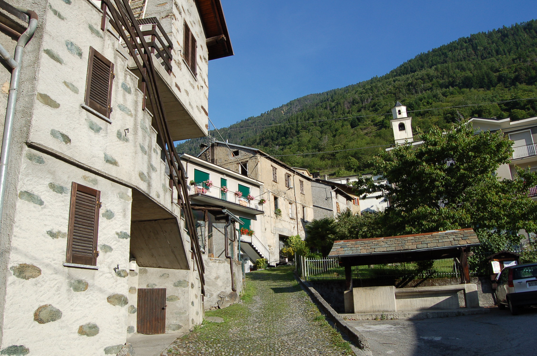 Scorcio della contrada Dossello in Barufffini Fraz. di Tirano Prov. Sondrio